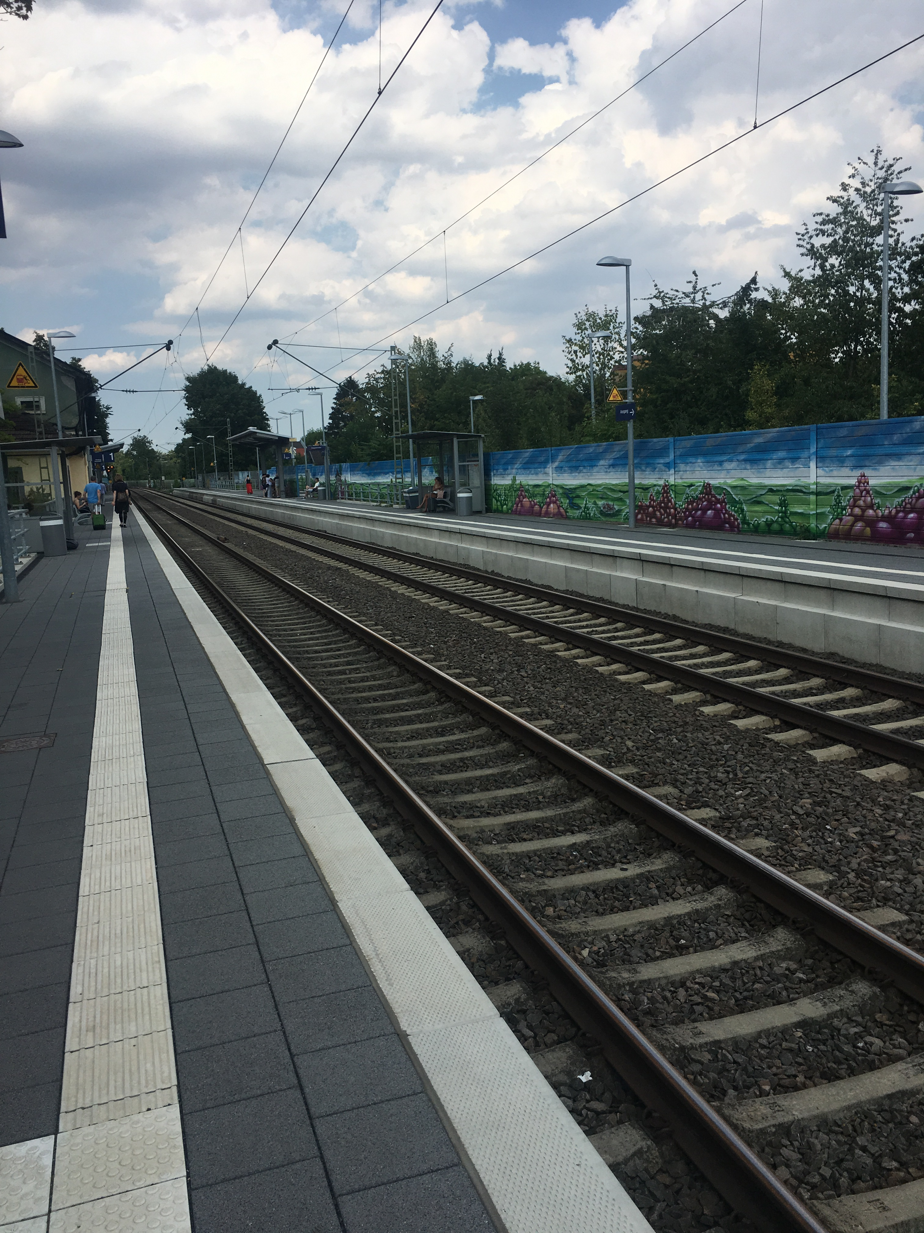 Bahnhof Mainz-Laubenheim